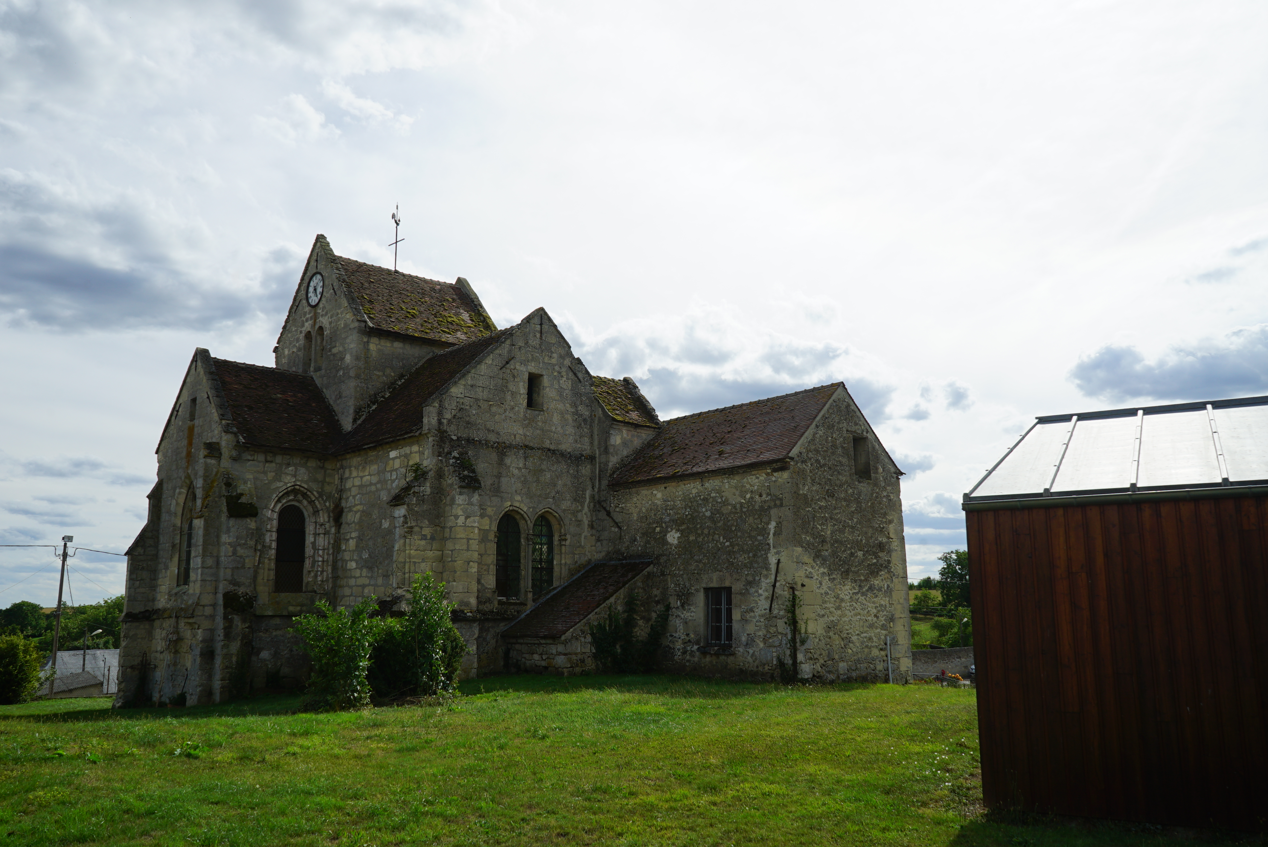 vue de Blanzy.